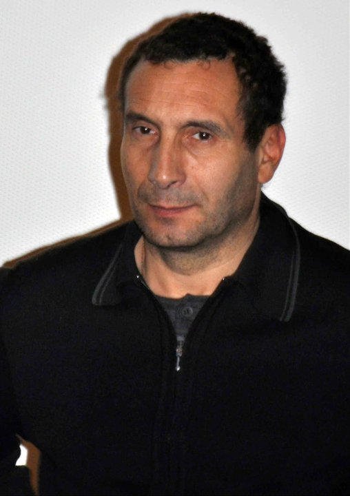 L'acteur Zinedine Soualem en 2010